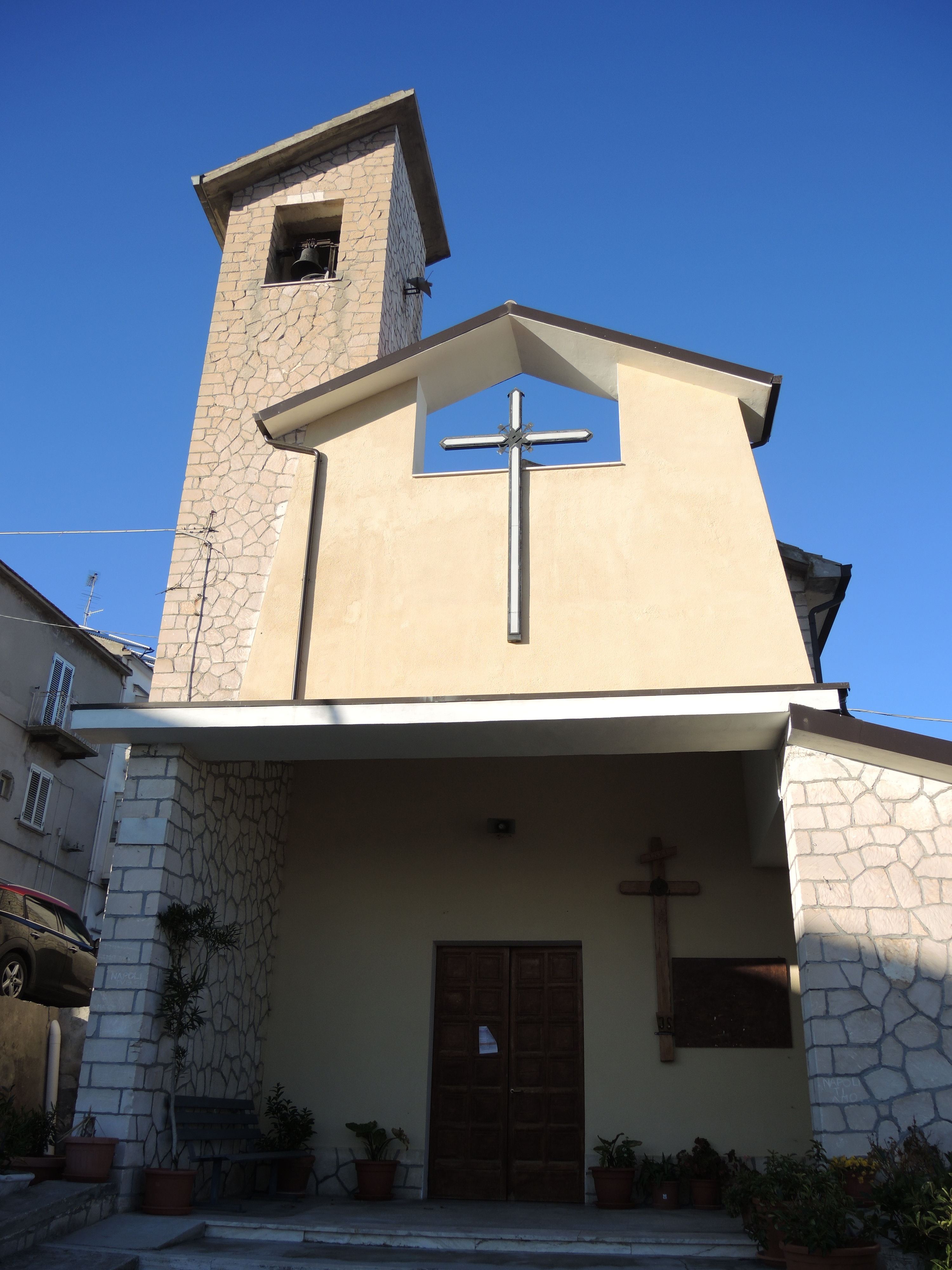 Tornareccio: Chiesa di San Giovanni Battista